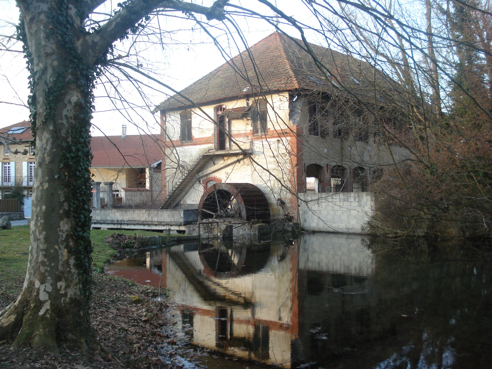 Le Moulin ancient à côte le Château du XVIIe siècle, Manthes (Drôme)